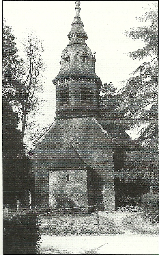 Chapelle de Miabnoye